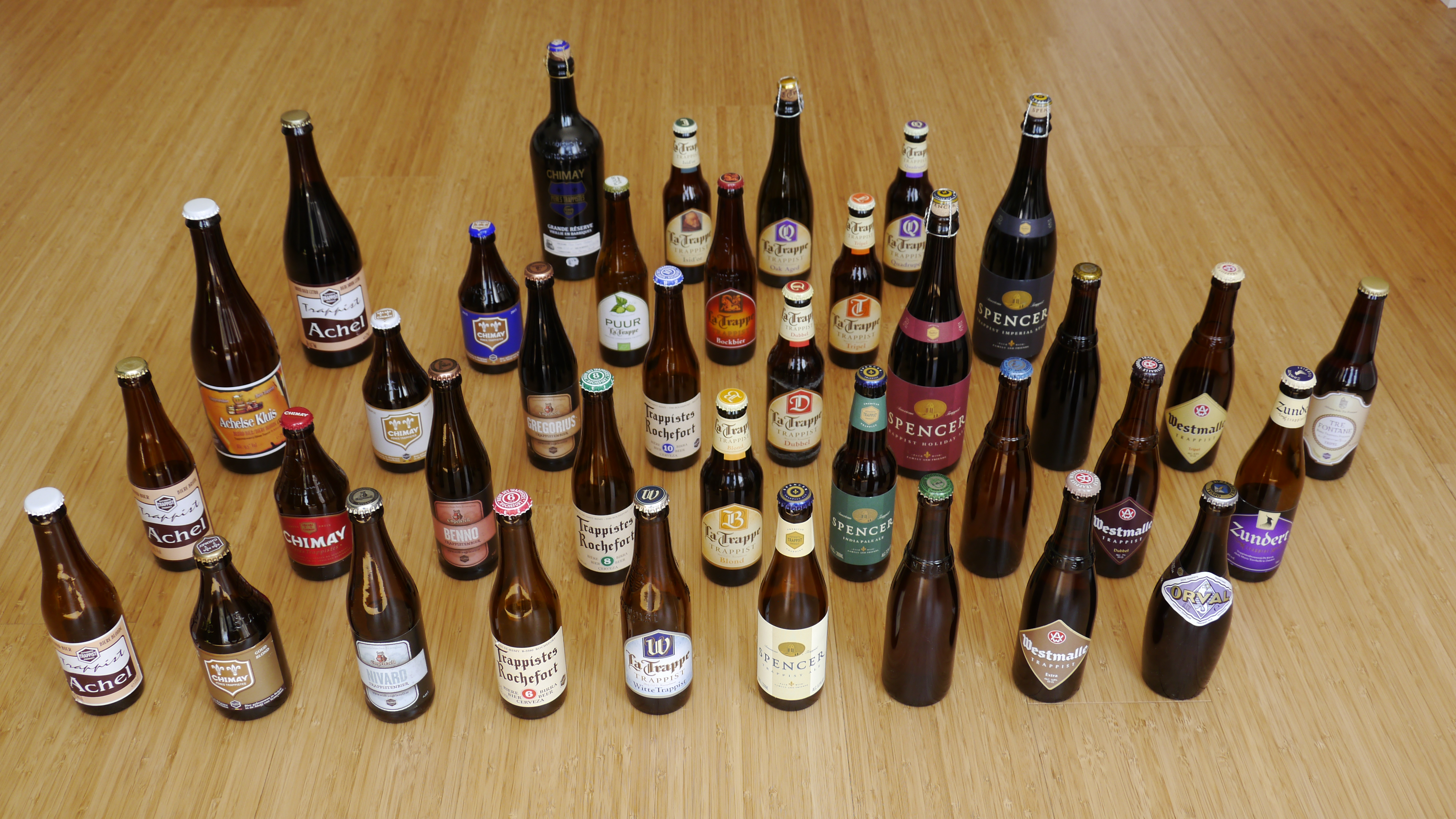 De flesjes van de meeste trappistenbieren